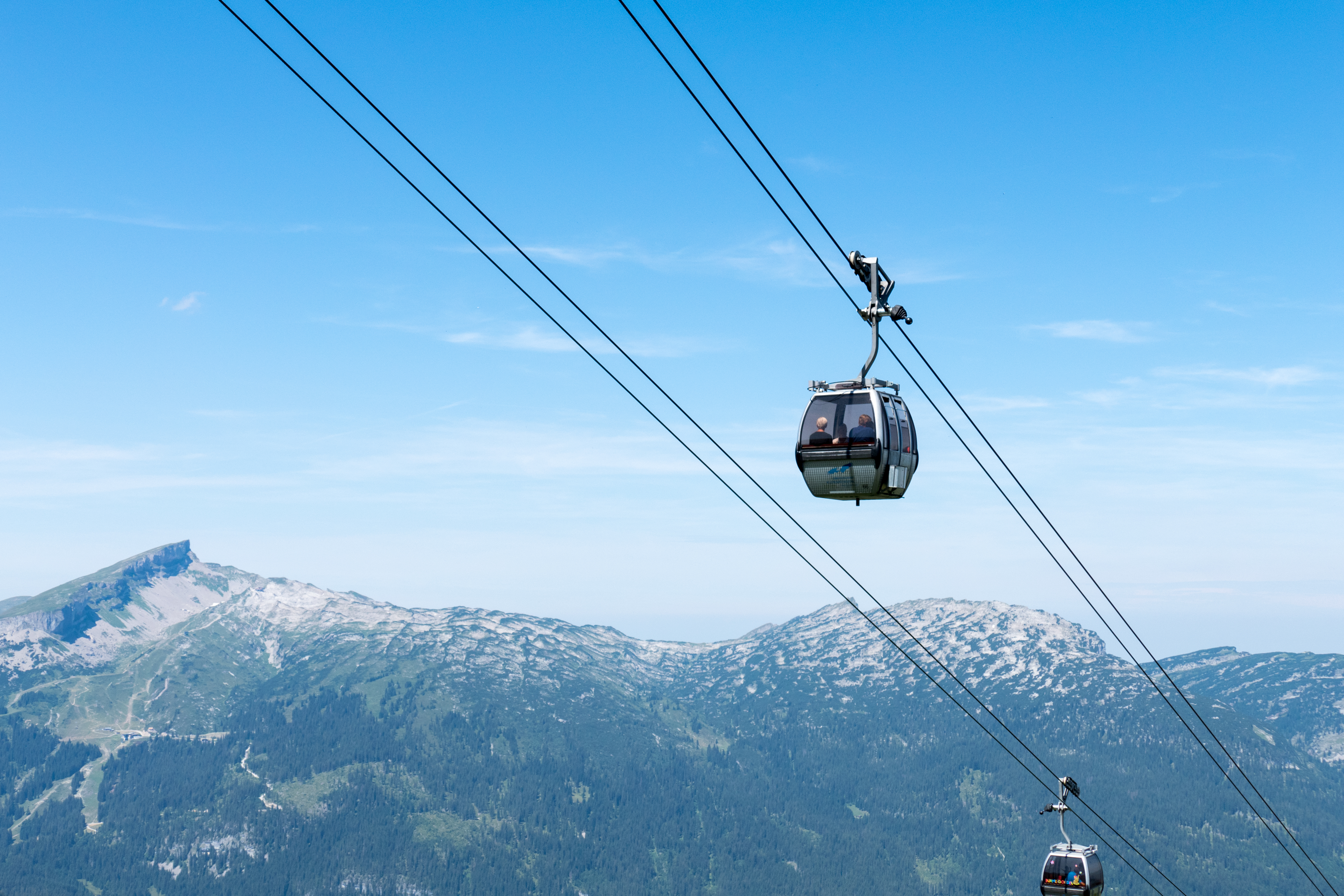 Die Kanzelwandbahn im Kleinwalsertal mit Ifen im Hintergrund